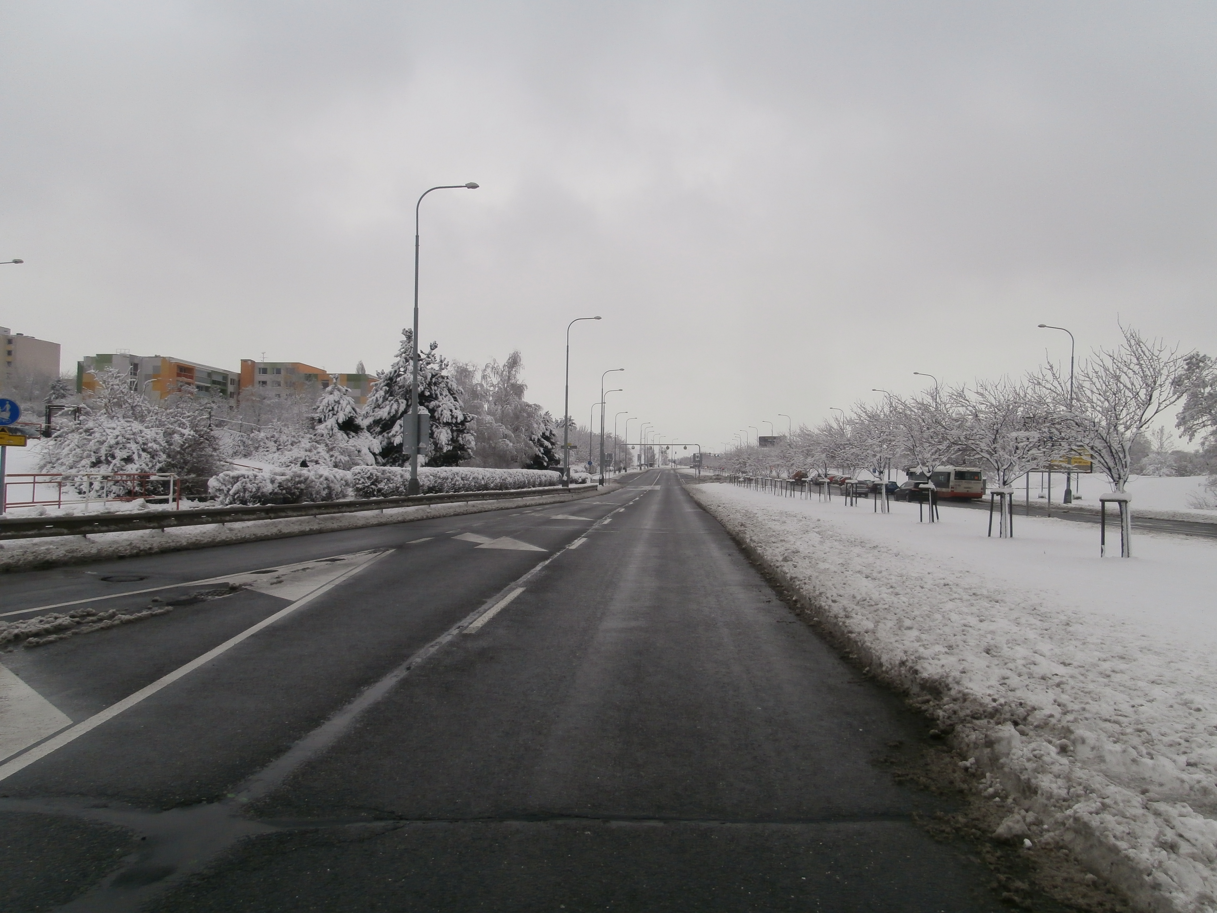 Jižní Město, ulice Chilská u stanice metra Opatov, pohled k jihu, v zimě, 1. 3. 2016